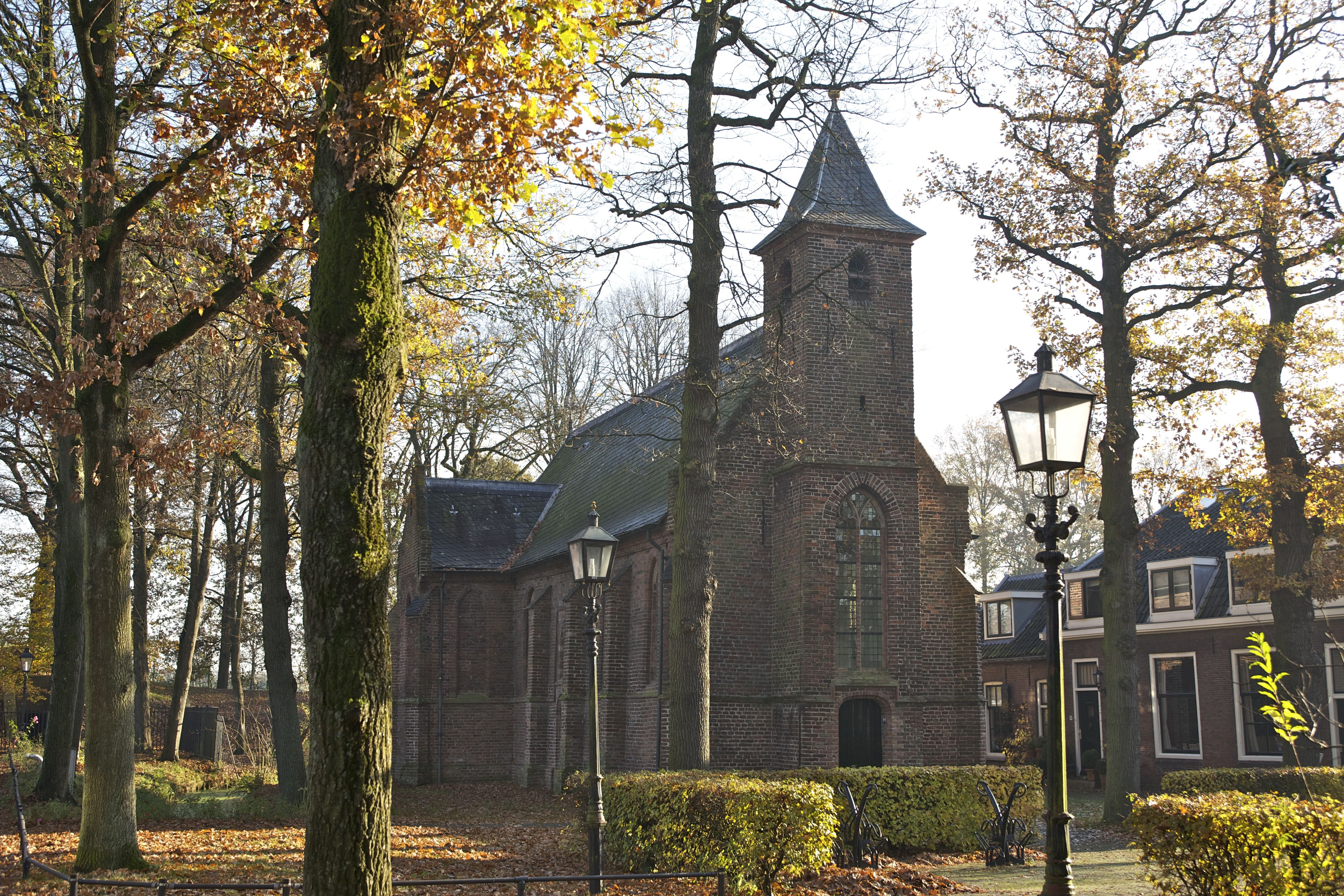 Het kerkje op Fort Blauwkapel in Utrecht noordoost - waar het fort naar is genoemd